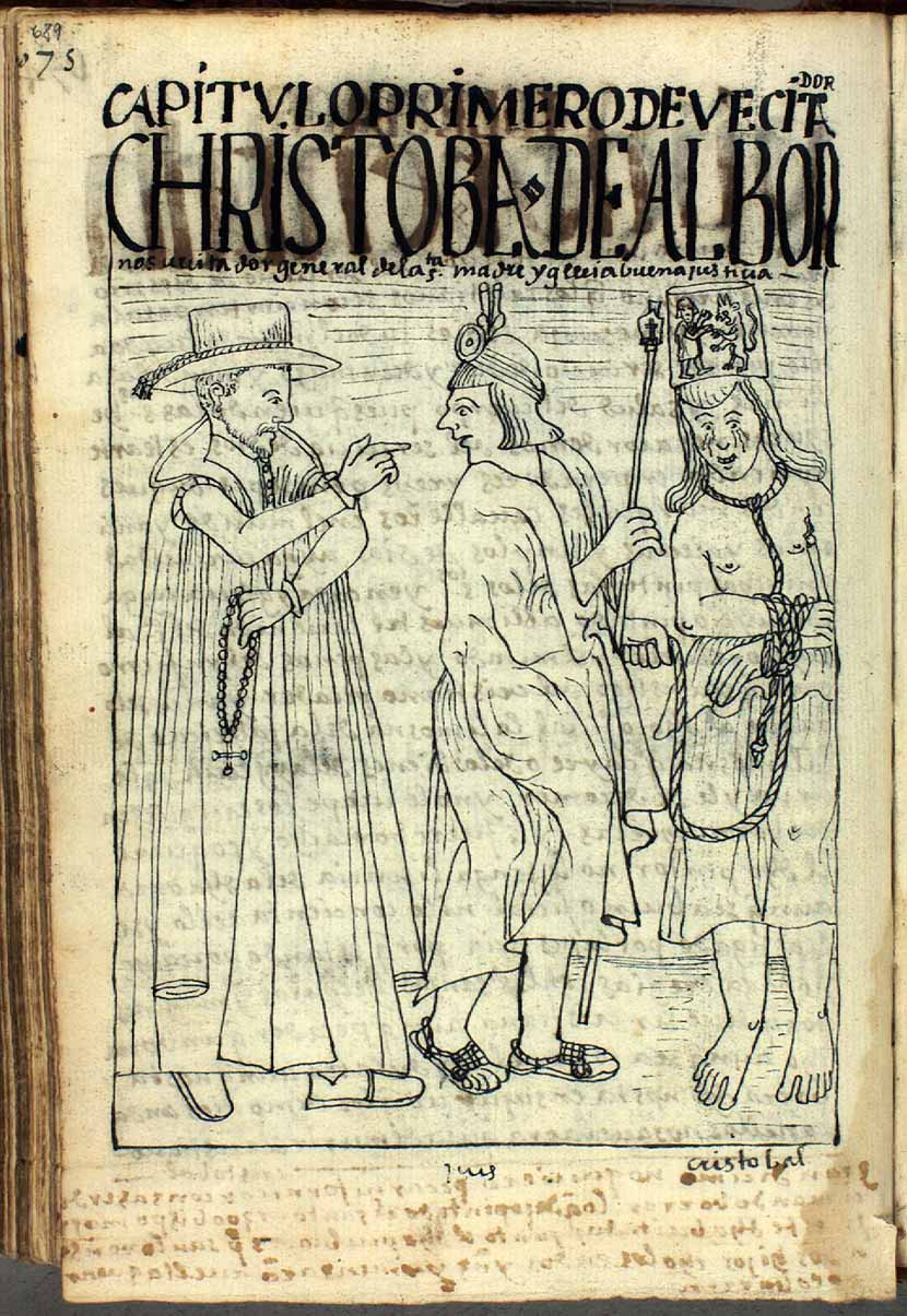 Retrato de Cristóbal de Albornoz, según Guaman Poma